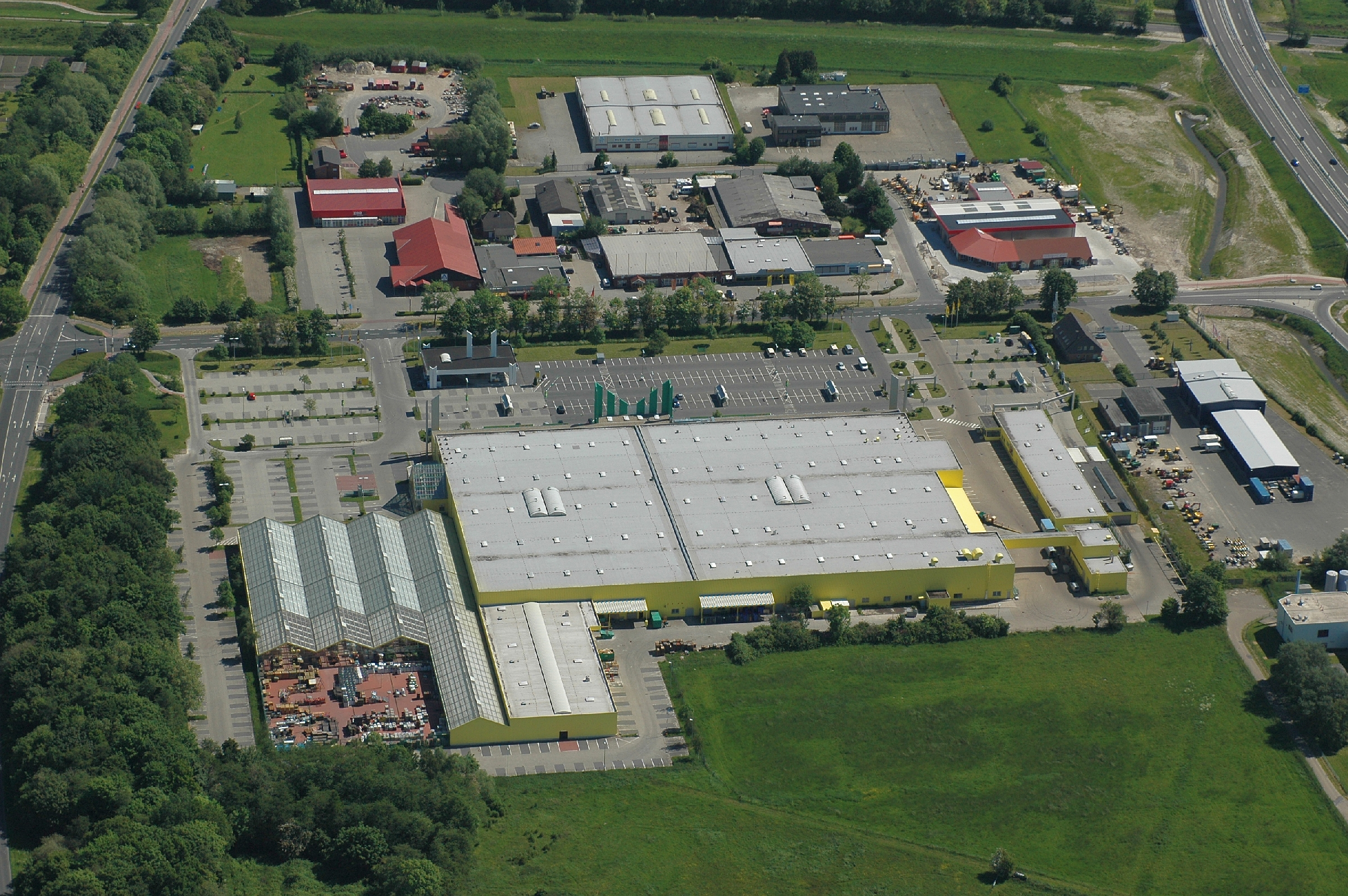 Fotoflug vom Flugplatz Nordholz-Spieka über Cuxhaven und Wilhelmshaven Zu sehen ist das Gewerbegebiet an der Voslapper Flutstraße. Detailliertere Beschreibung siehe File:2012-05-28 Fotoflug Cuxhaven Wilhelmshaven DSCF9580.jpg, die hier zusätzlich zu sehende Straße links ist die Arthur-Grunewald-Straße (heißt im weiteren Verlauf Posener Straße).